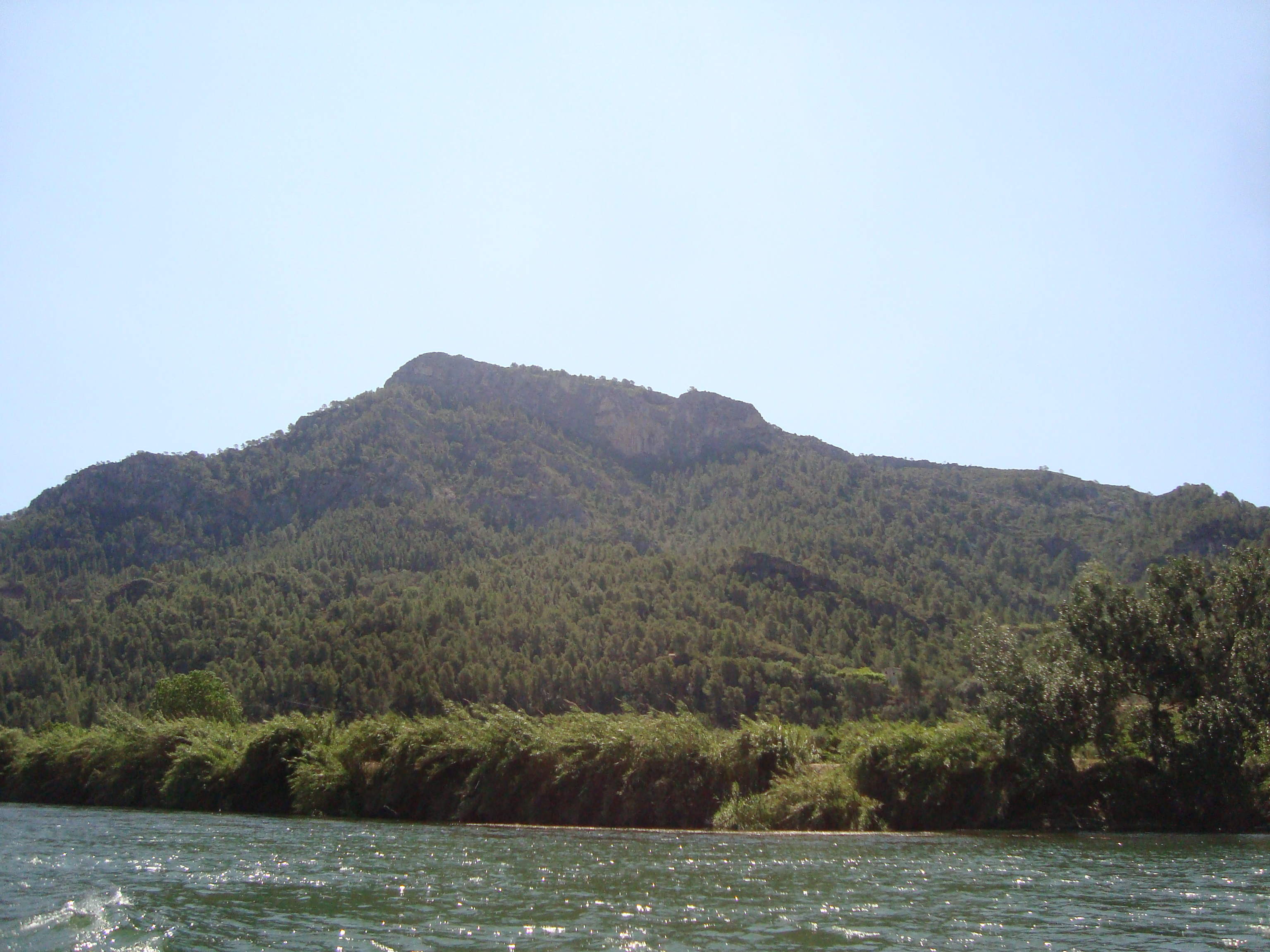 Sierras de Cardó-el Boix (Benifallet, Tarragona)